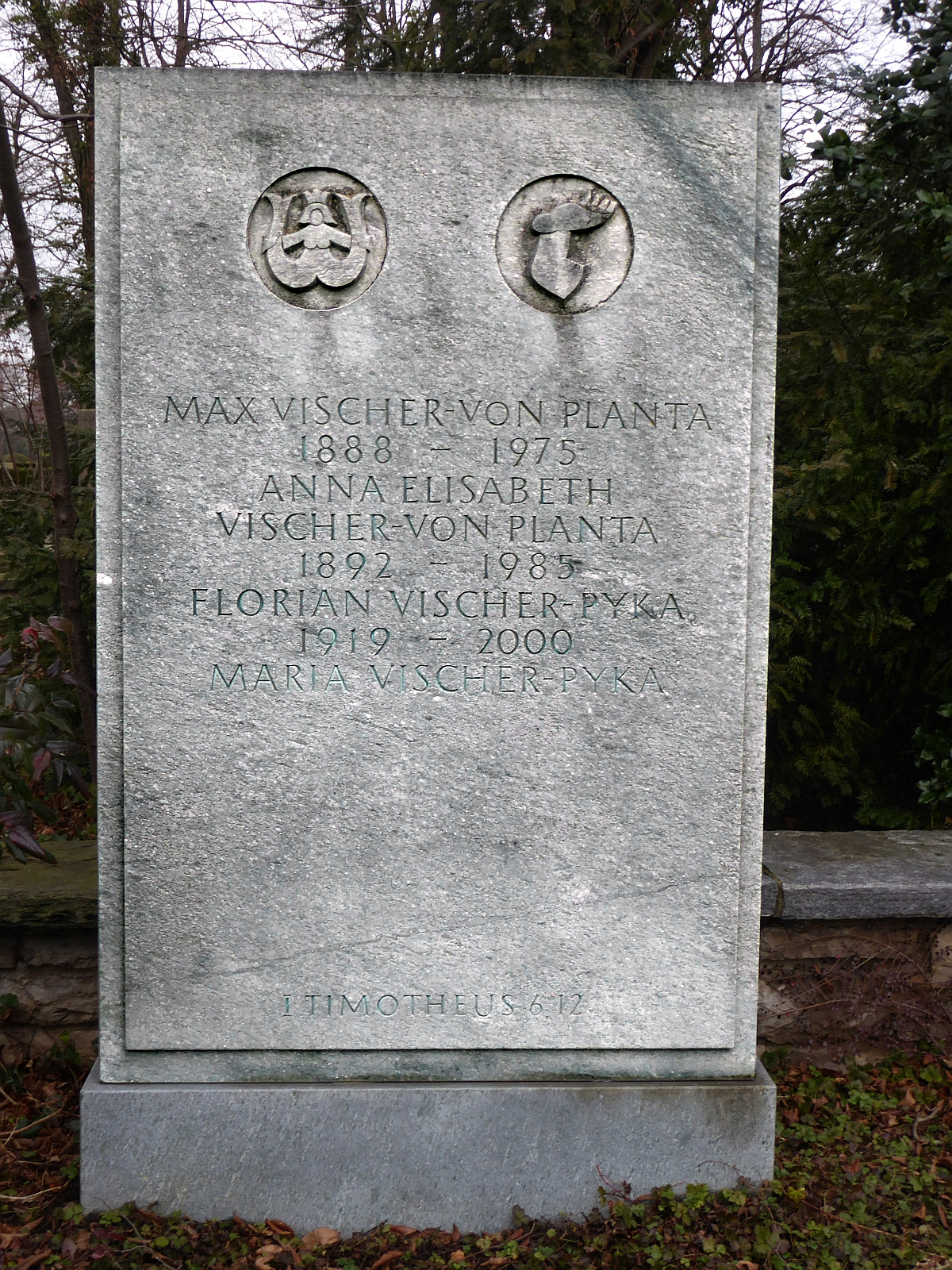 Florian Vischer-Pyka (1919–2000) Architekt, Familiengrab auf dem Friedhof Hörnli, Riehen, Basel-Stadt